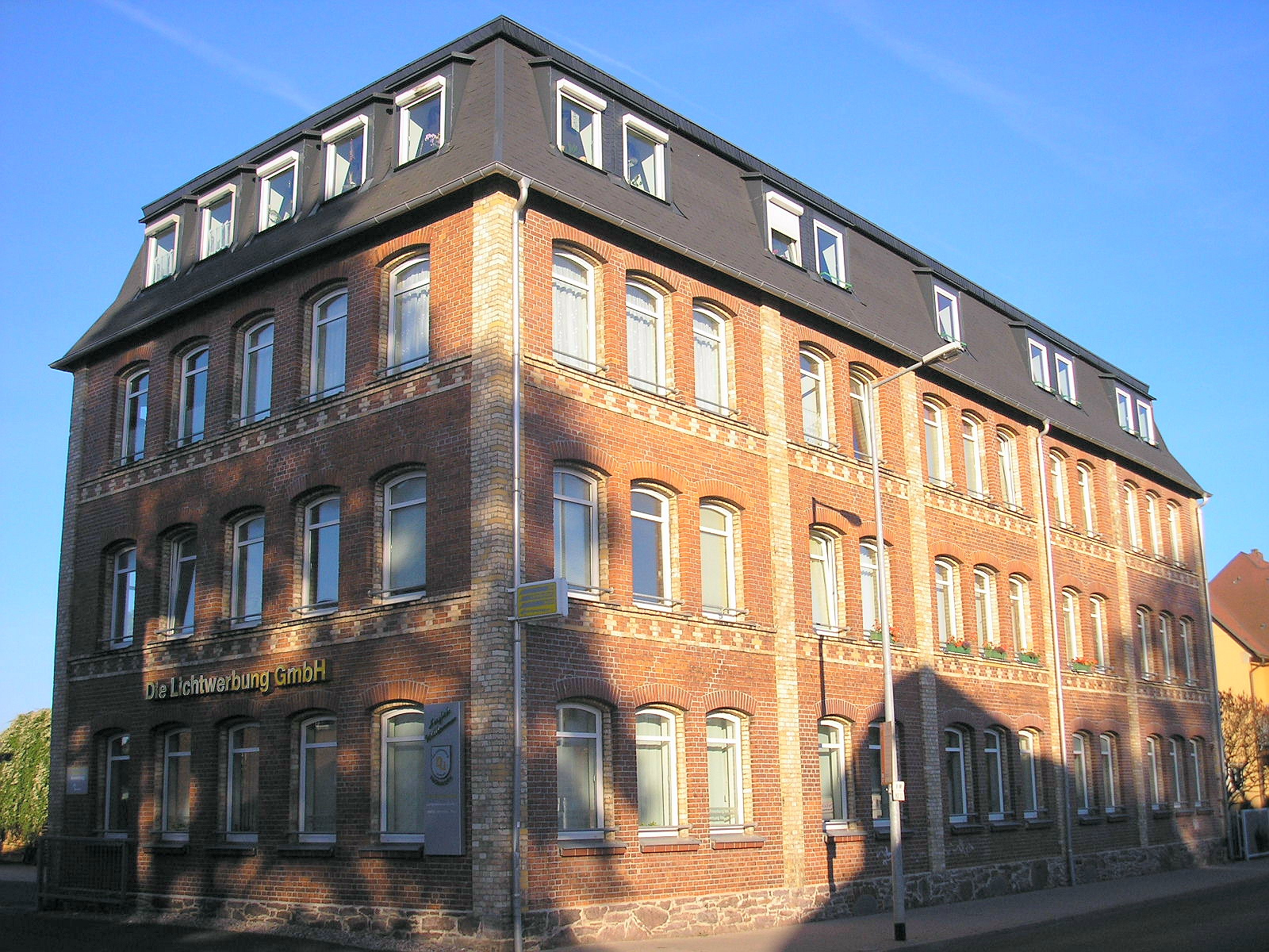 Ein Bürogebäude in der Langewiesener Straße in Ilmenau (Thüringen)